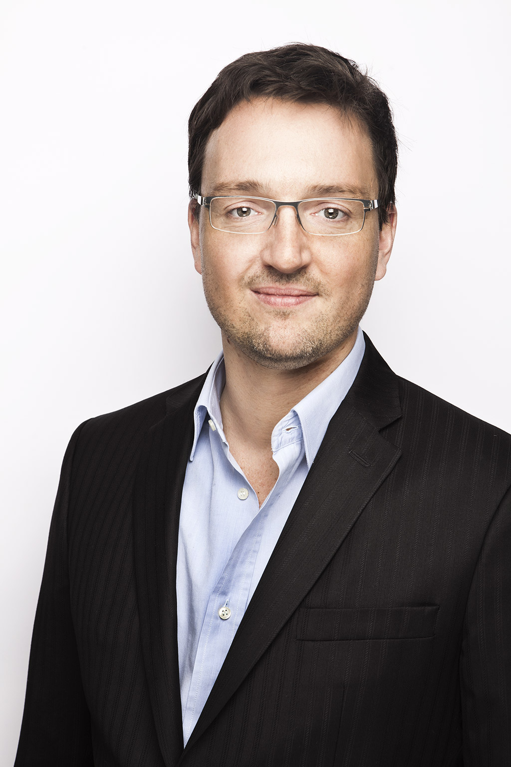 Axel Schmiegelow ist ein deutscher Unternehmer, Gründer und Investor in Startup-Unternehmen aus dem Bereich Social Media.